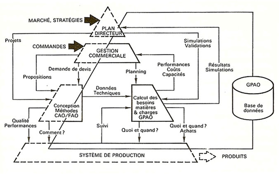 La pyramide du CIM (Computer Integrated Manufacturing) est une méthode largement généralisée (en particulier dans l'informatique). Il s'agit d'une représentation comportant 4 niveaux auxquels correspondent des niveaux de décision. Plus on s'élève dans la Pyramide du CIM, plus le niveau de décision est important, plus la visibilité est globale et plus les cycles standards s'allongent. Un niveau supérieur décide ce qu'un niveau inférieur exécute. (source : "CIM, les nouvelles perspectives de la production", Jean-Baptiste Waldner, DUNOD-BORDAS, Paris, 1990. Reproduit avec l'autorisation de l'auteur) OTRS ticket 2011051210004131 confirmes that User:Jbw (the original uploader) is Jean-Baptiste Waldner.